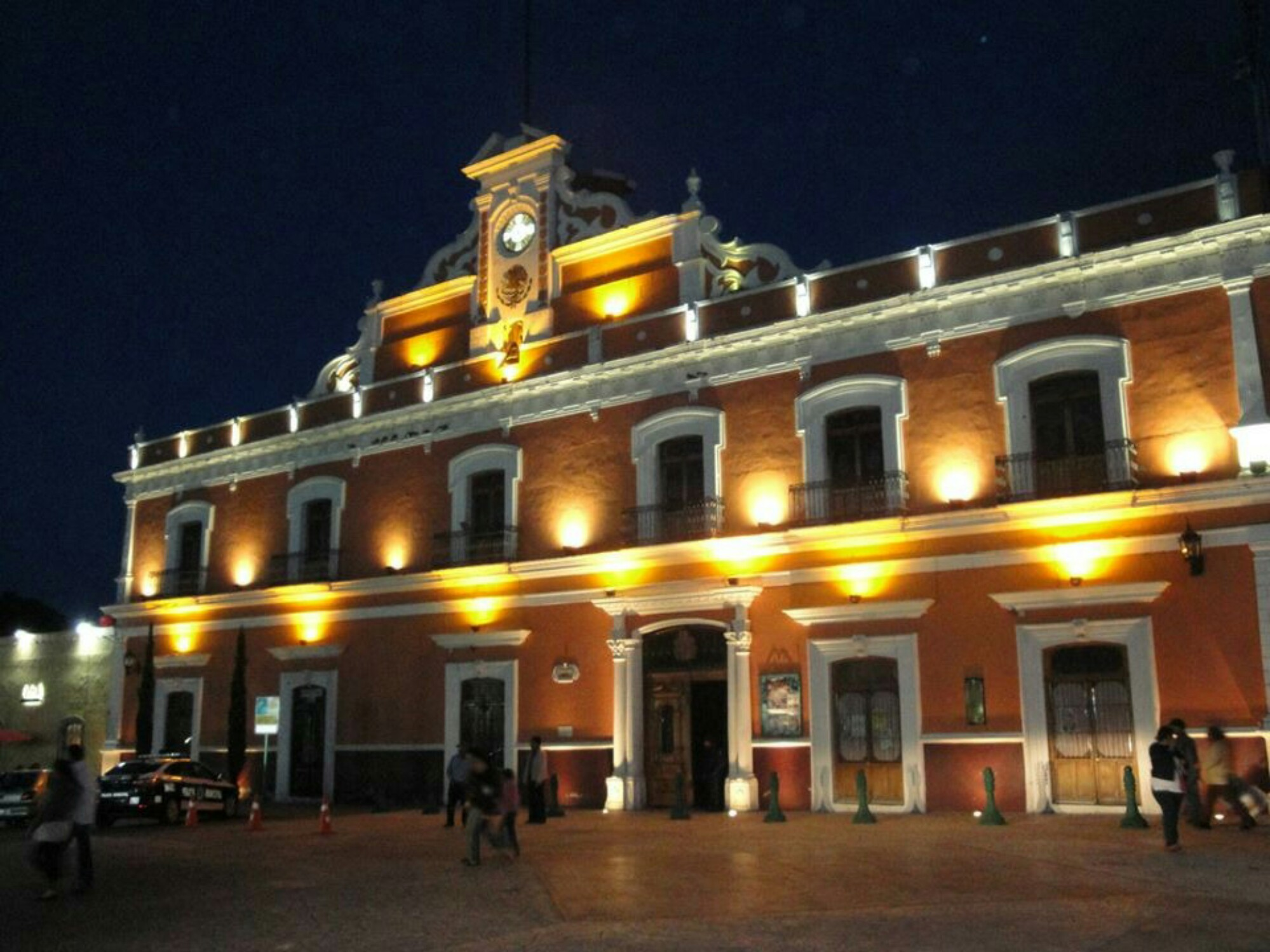 Palacio municipal de Huamantla at night